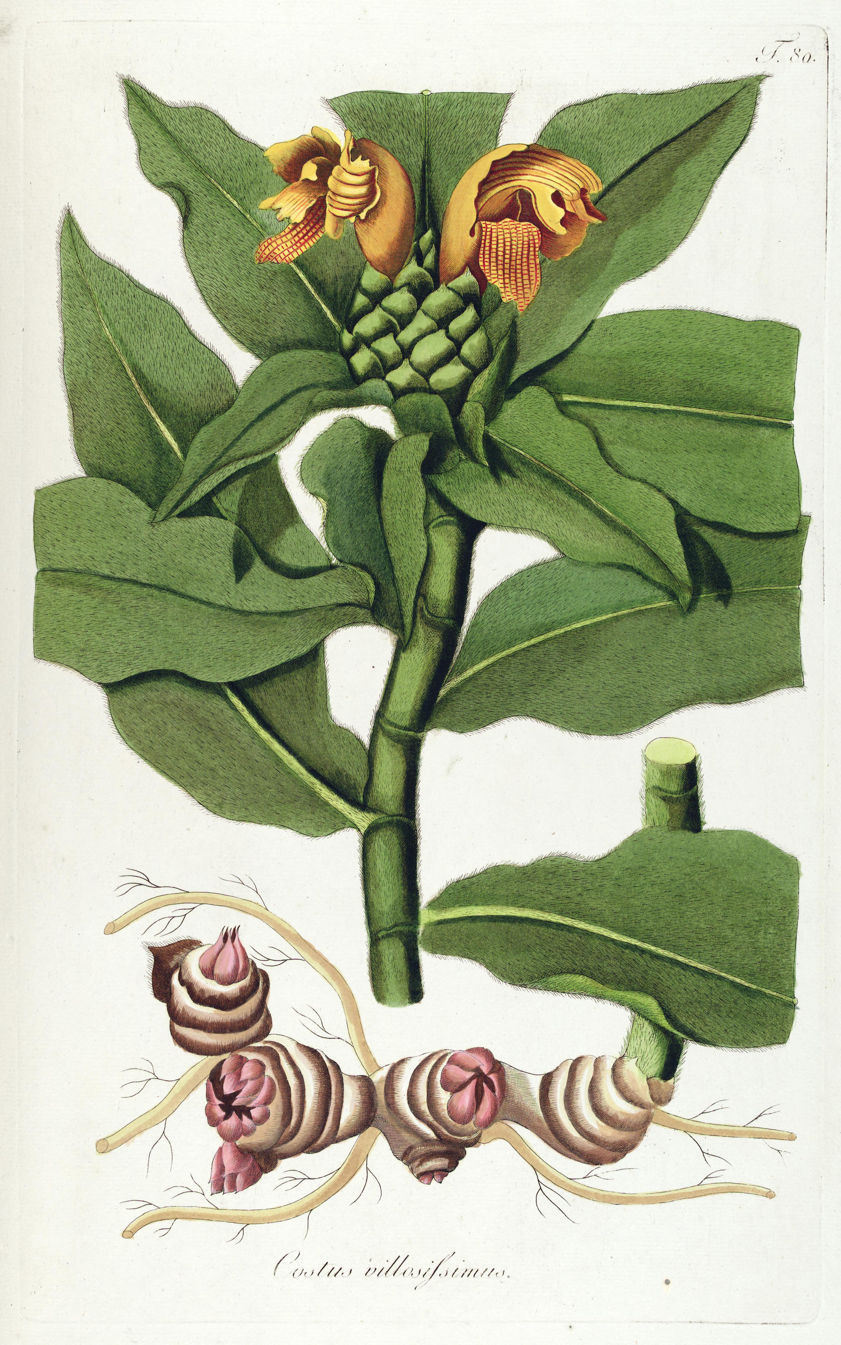 Fragmenta botanica, figuris coloratis illustrata :ab anno 1800 ad annum 1809 per sex fasciculos edita /opera et sumptibus Nicolai Josephi Jacquin.